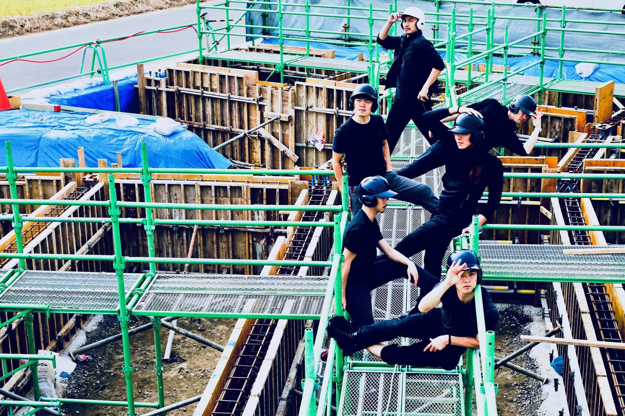 Photo by chau elsie